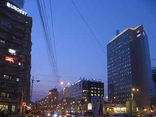 BRD-Tower, Bucharest